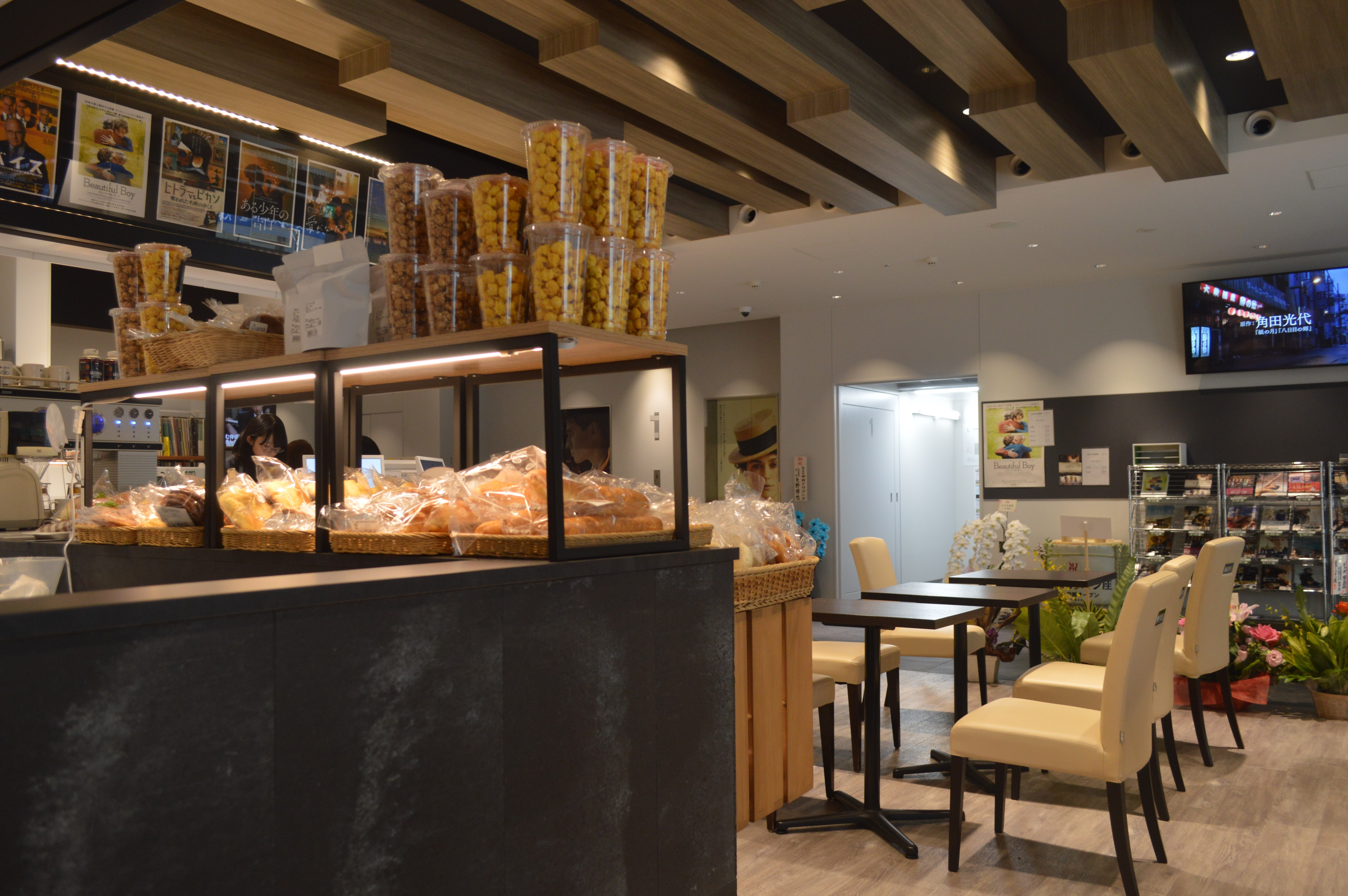 愛知県名古屋市中区にある映画館「伏見ミリオン座」。2019年4月12日の移転後の建物。